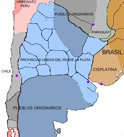 MAPA PROVINCIAS UNIDAS EN 1821